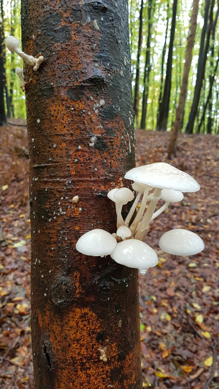 Bela lesna gliva na bukvi, slikano v Pesnici pri Mariboru, avtor: Tanja Eder